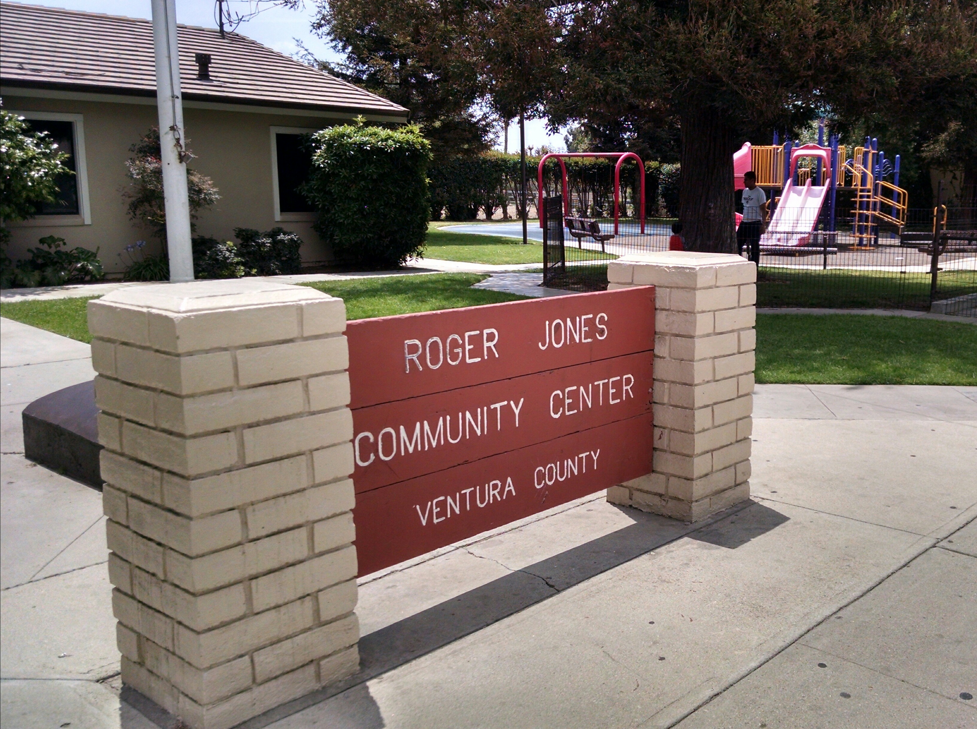 El Rio, California